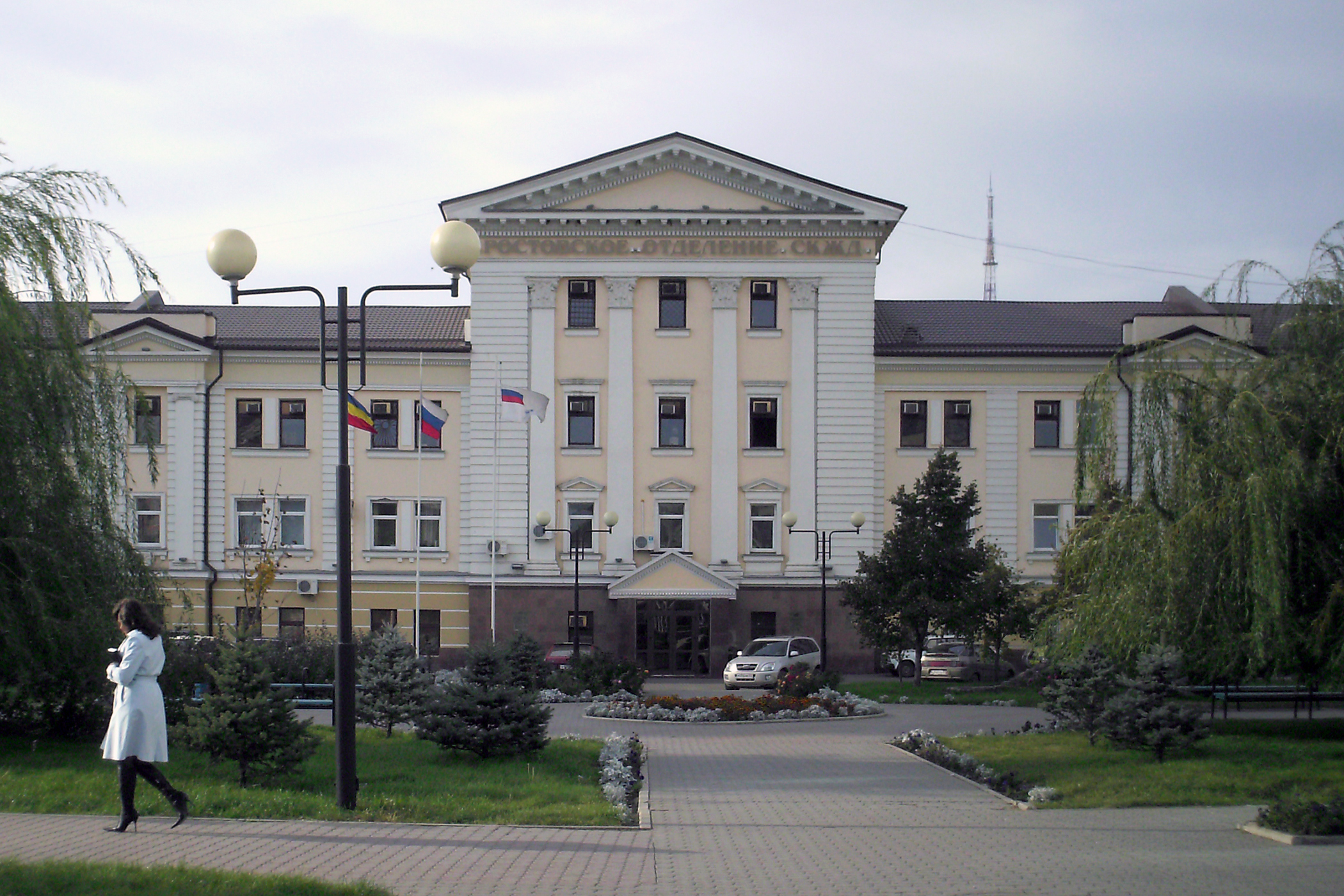 Ростов на Дону